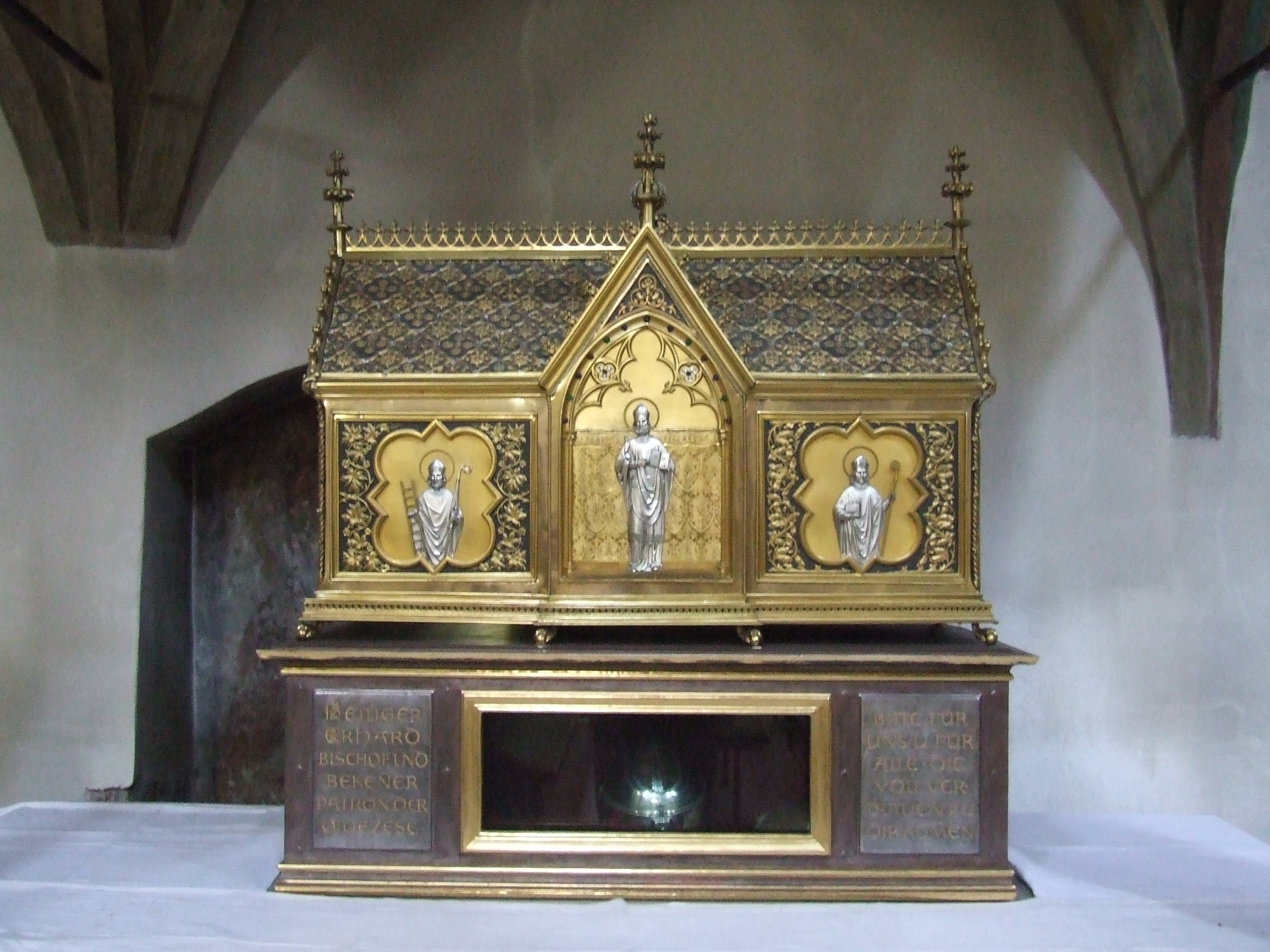 Stadt Regensburg, Niedermünster-Kirche innen, Erhardi-Schrein aus dem Jahr 1868 mit den Reliquien des Hl. Erhards